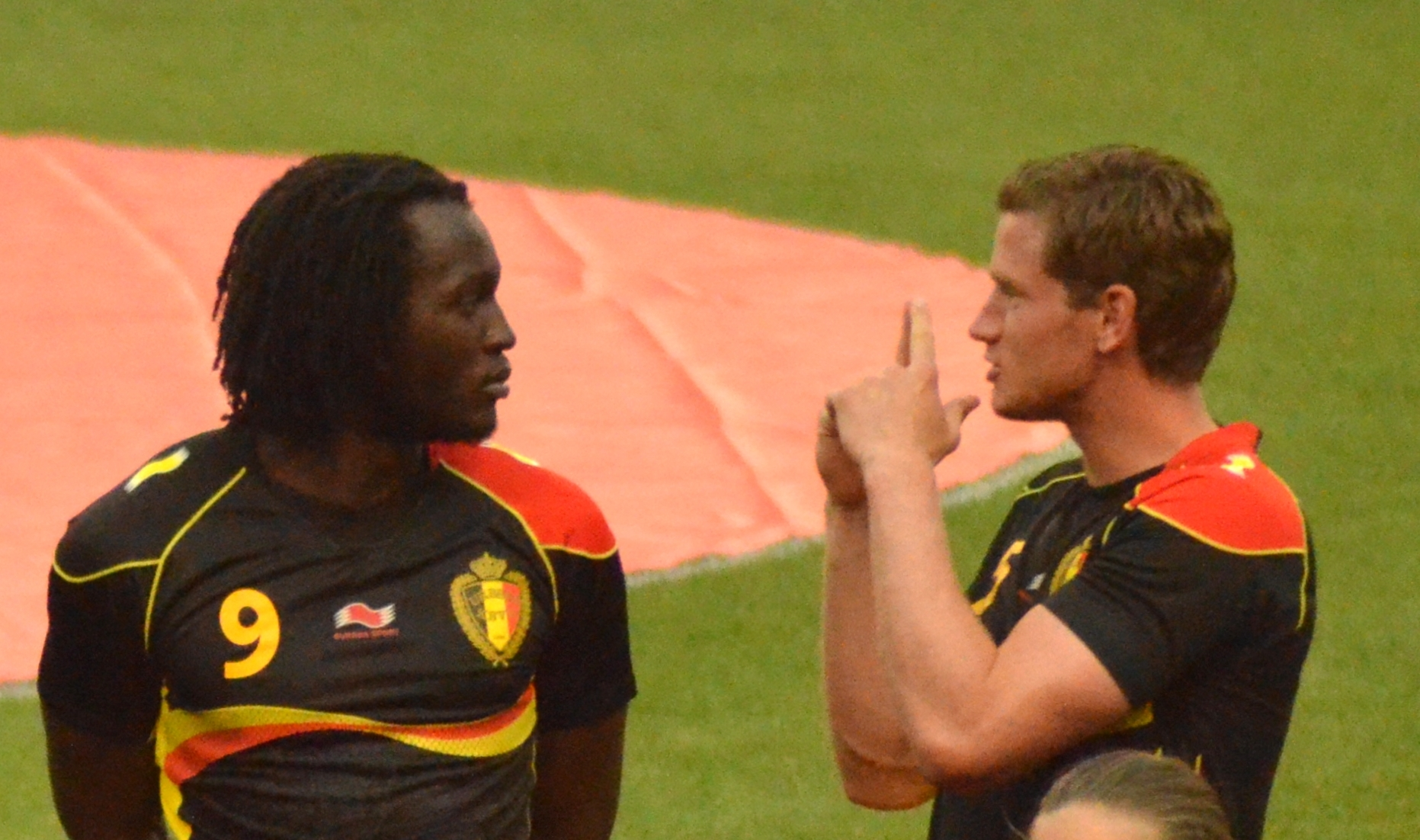 Romelu Lukaku and Jan Vertonghen